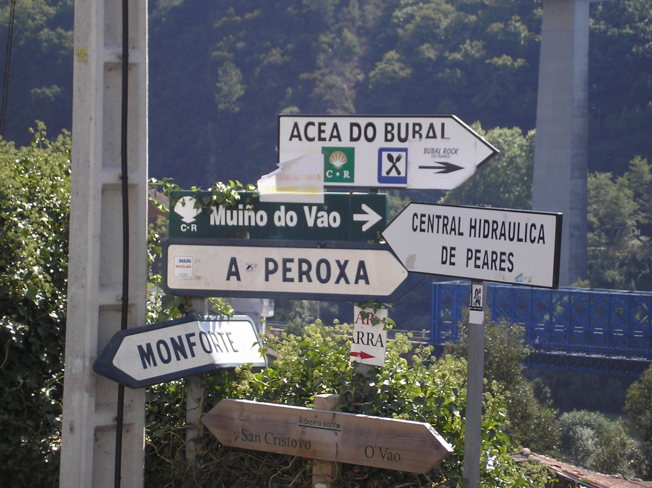 A Granxa, Oleiros, Carballedo